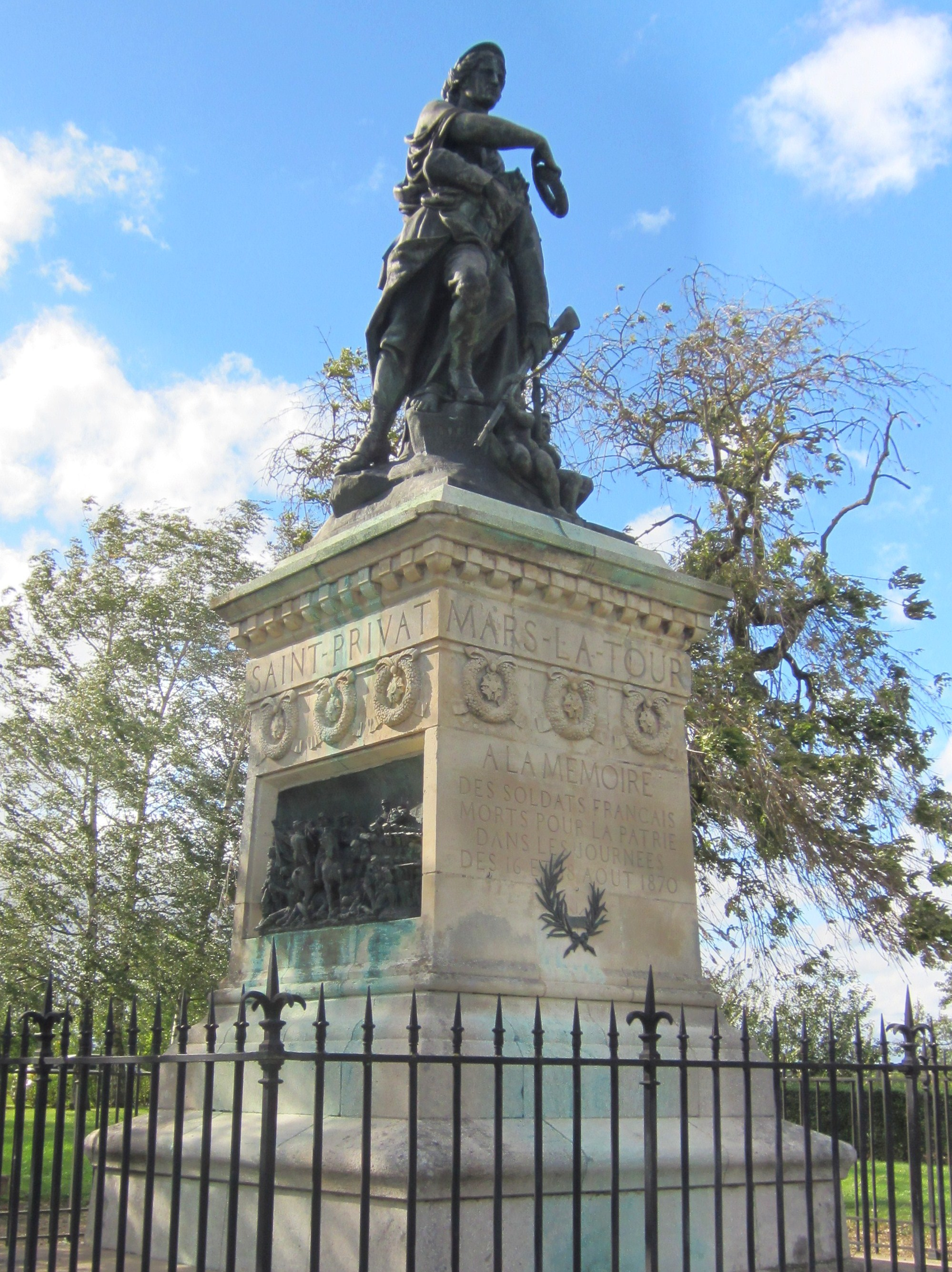 Description monument morts Mars la Tour, sculpture de Frédéric Bogino Date13 September 2011Sourcemon appareil photoAuthorAimelaimePermission (Reusing this file) monument morts Mars la Tour, sculpture de Frédéric Bogino